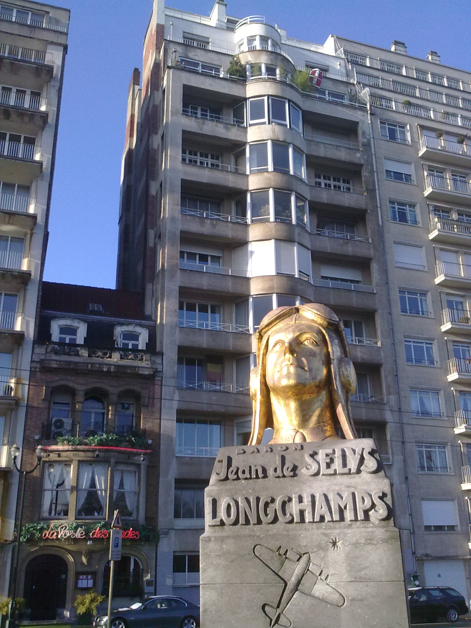 Statue à la mémoire de Jean de Selys-Longchamp et de son attaque aérienne sur le siège de la Gestapo, avenue Louise à Bruxelles. (bâtiment de 10 étages à l'arrière plan)